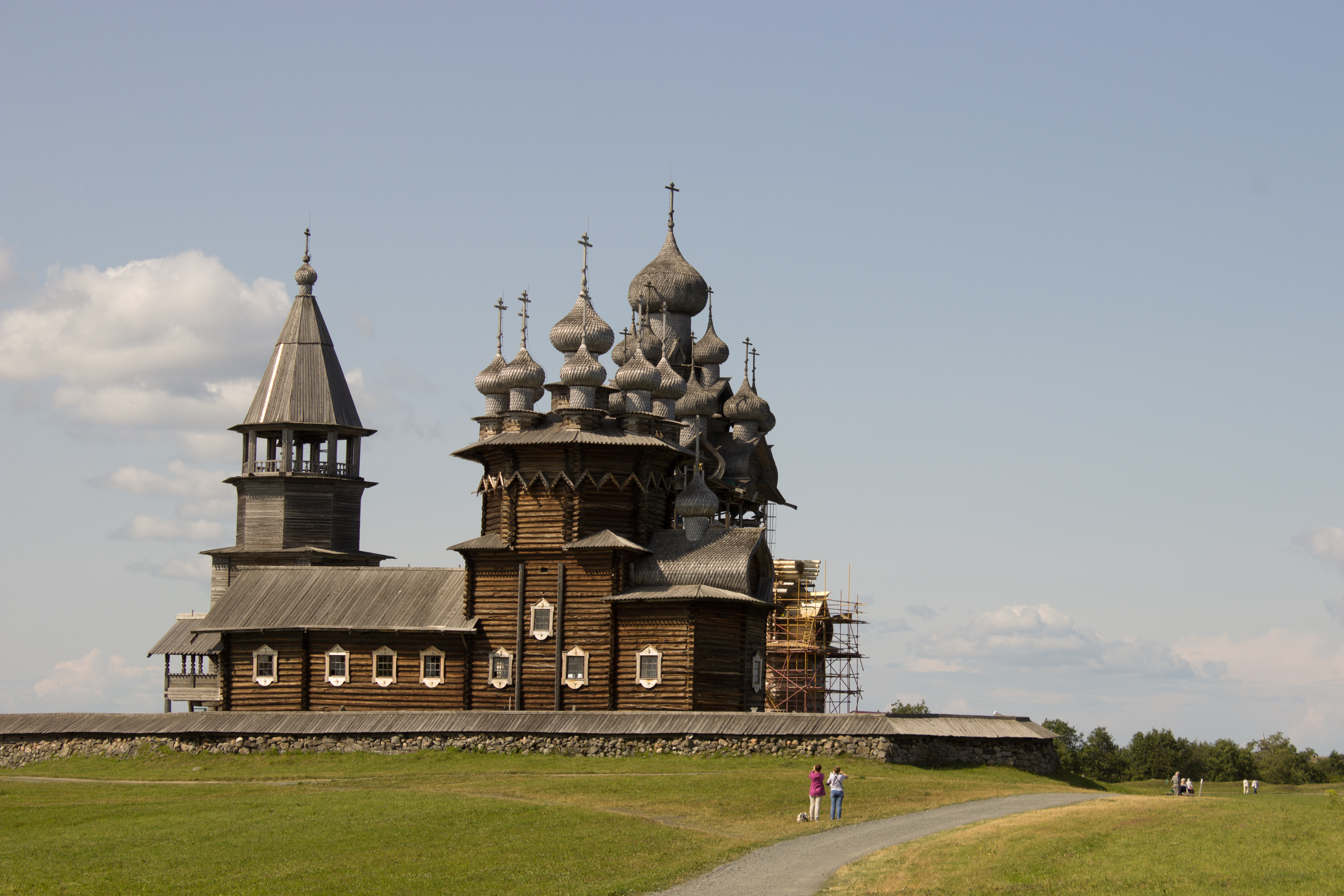 Церковь Преображения Господня: остров Кижи, Медвежьегорский район, Карелия